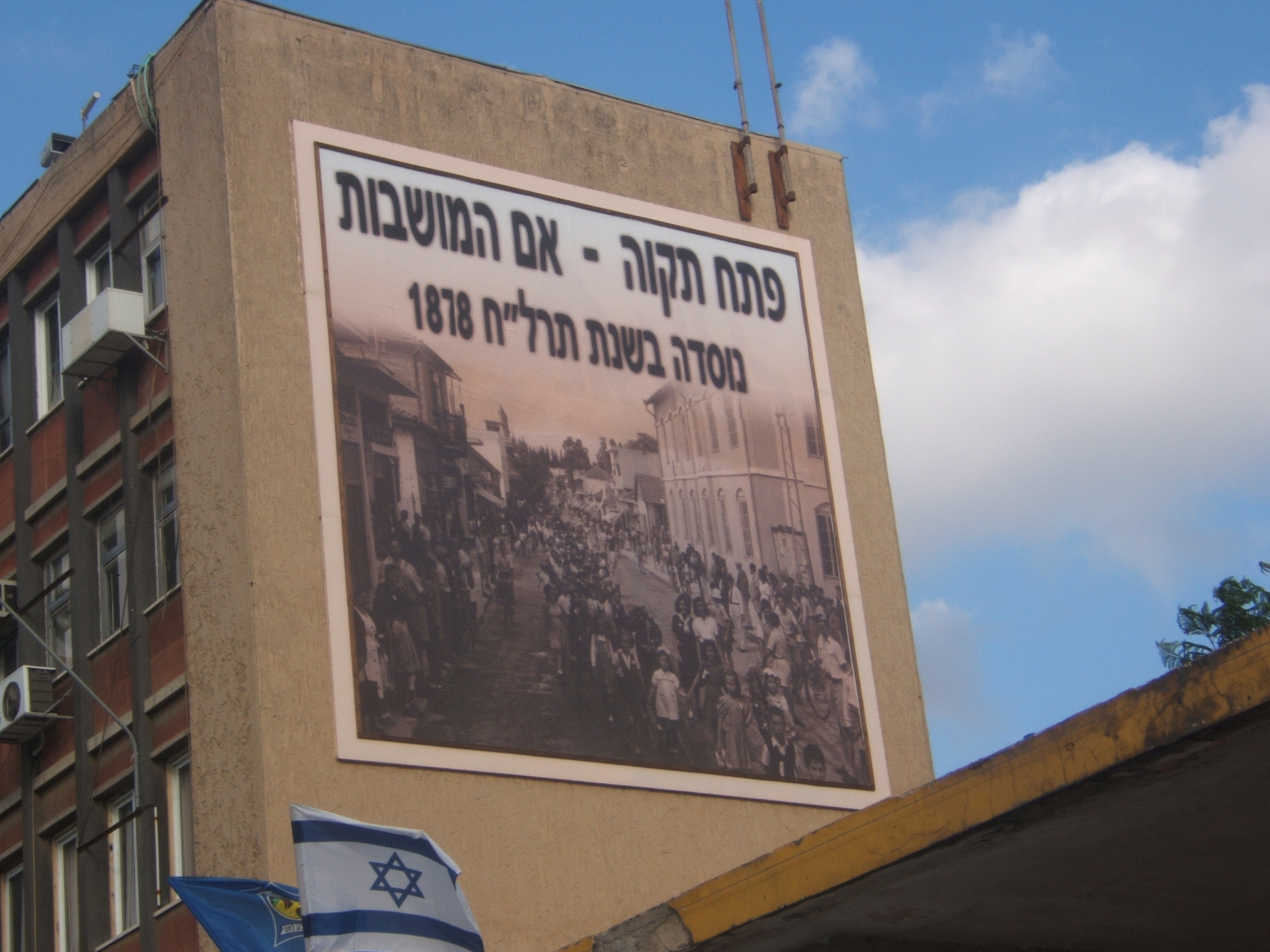 בניין העירייה של פתח תקווה. הצילום נעשה על ידי.